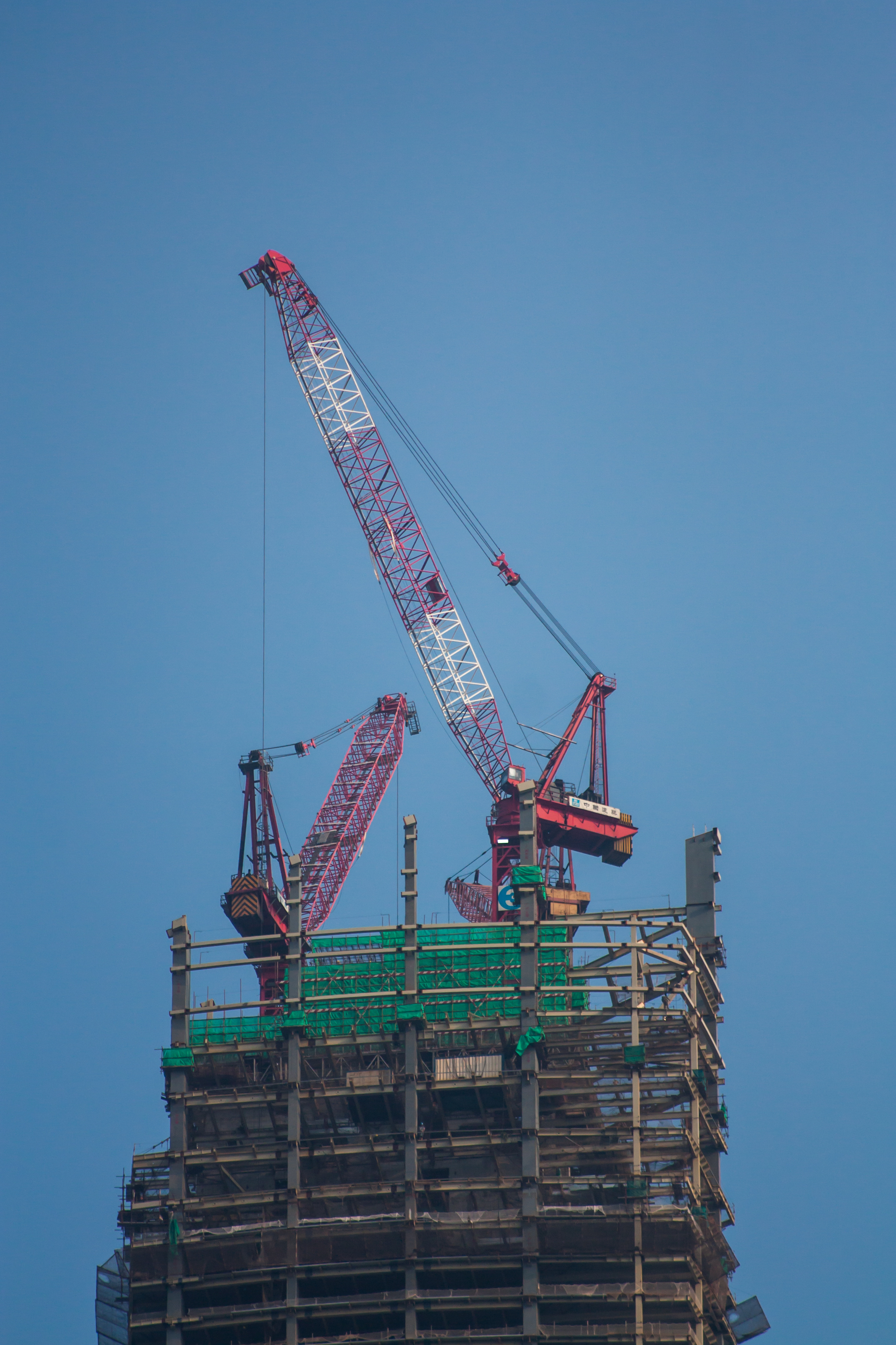 建造中的廣州周大福金融中心（廣州東塔）頂部細節。